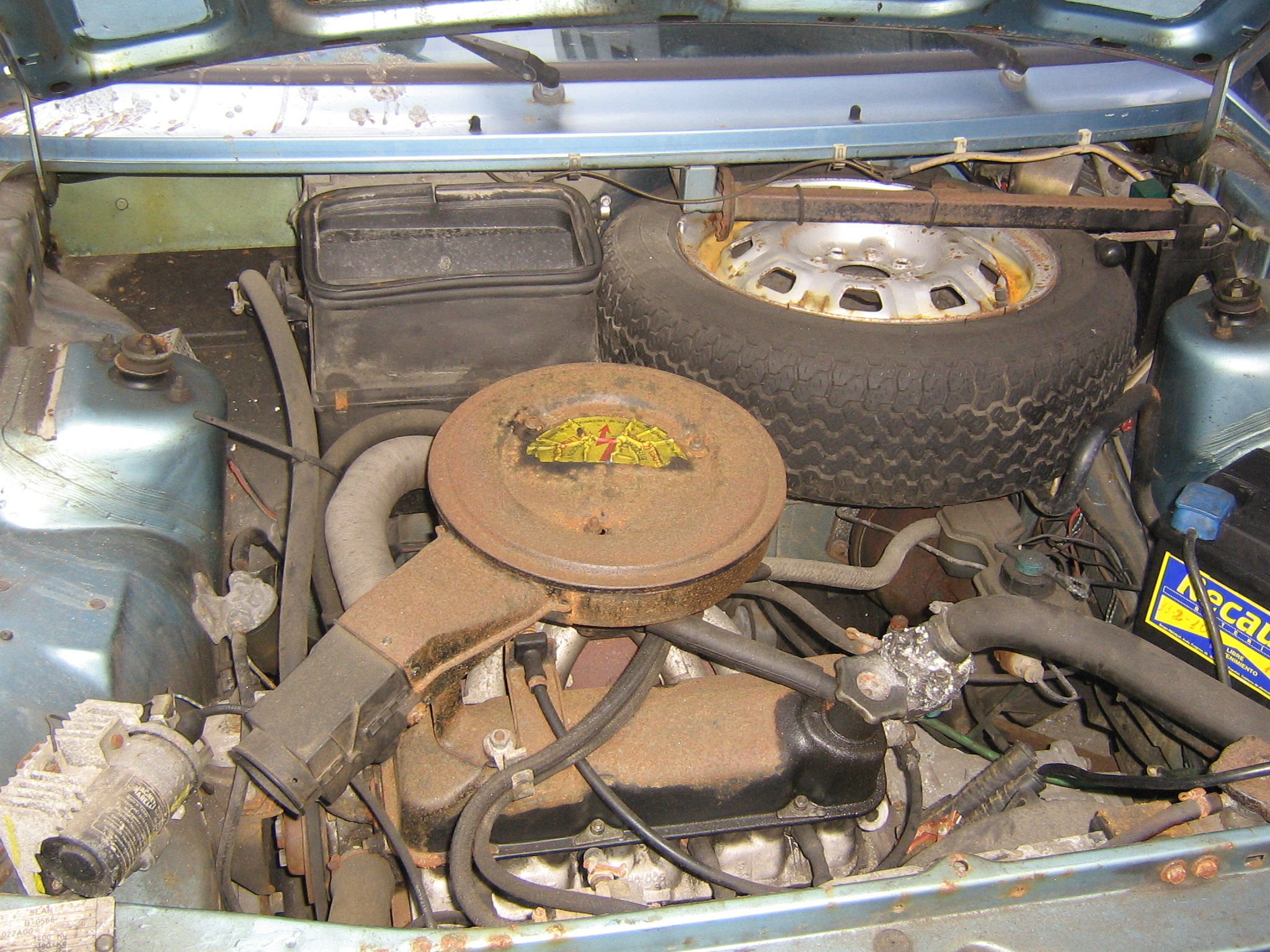 Motor de un SEAT Ronda.